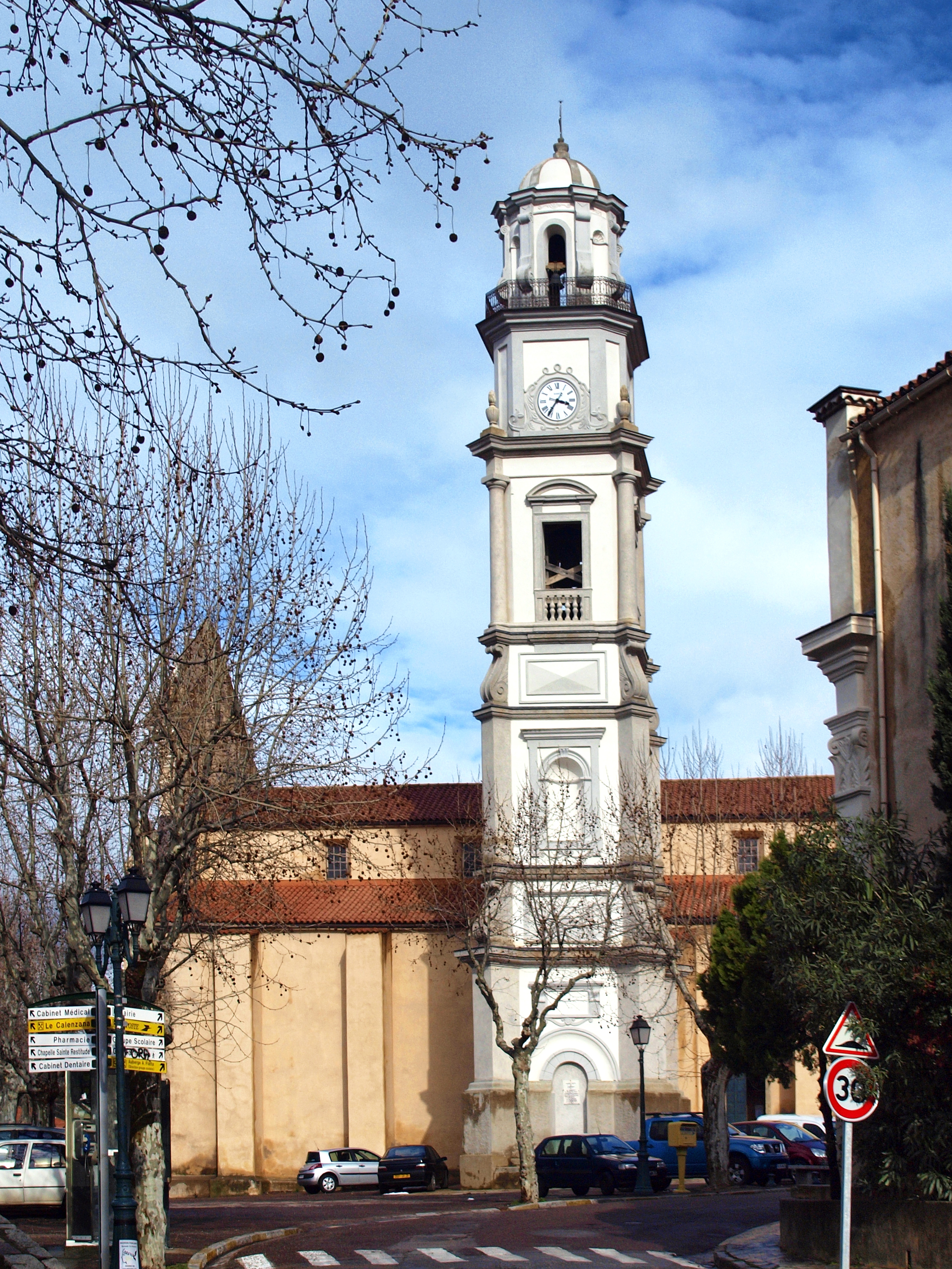 Calenzana, Balagne (Haute-Corse)- L'église paroissiale Saint-Blaise avec son campanile isolé, classée. .